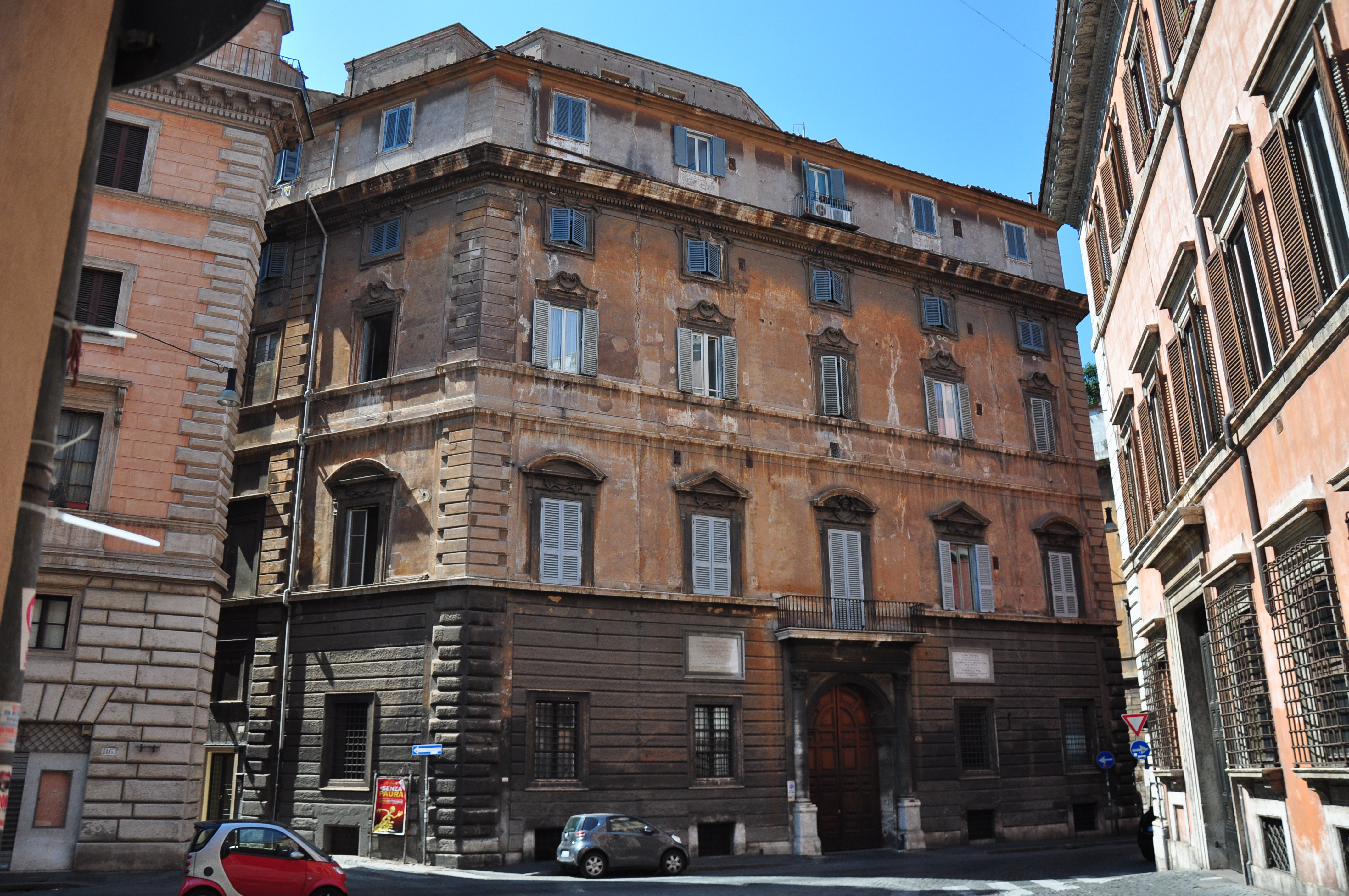 Facciata su via della Scrofa di Palazzo Aragona Gonzaga Galitzine, via della Scrofa, 117